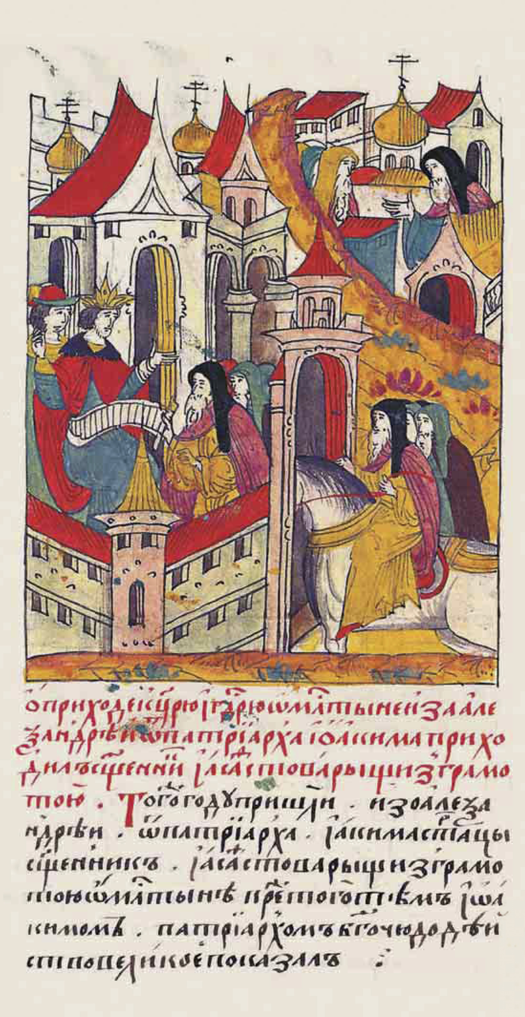 О приходе к царю и государю за милостыней: из Александрии от патриарха Иоакима с грамотой приходил священник Иоасаф с товарищами. В том же году пришли из Александрии от патриарха Иоакима старцы: священник Иоасаф с товарищами с грамотой о милостыне. Ранее того с тем же Иоакимом патриархом Бог великое чудо показал